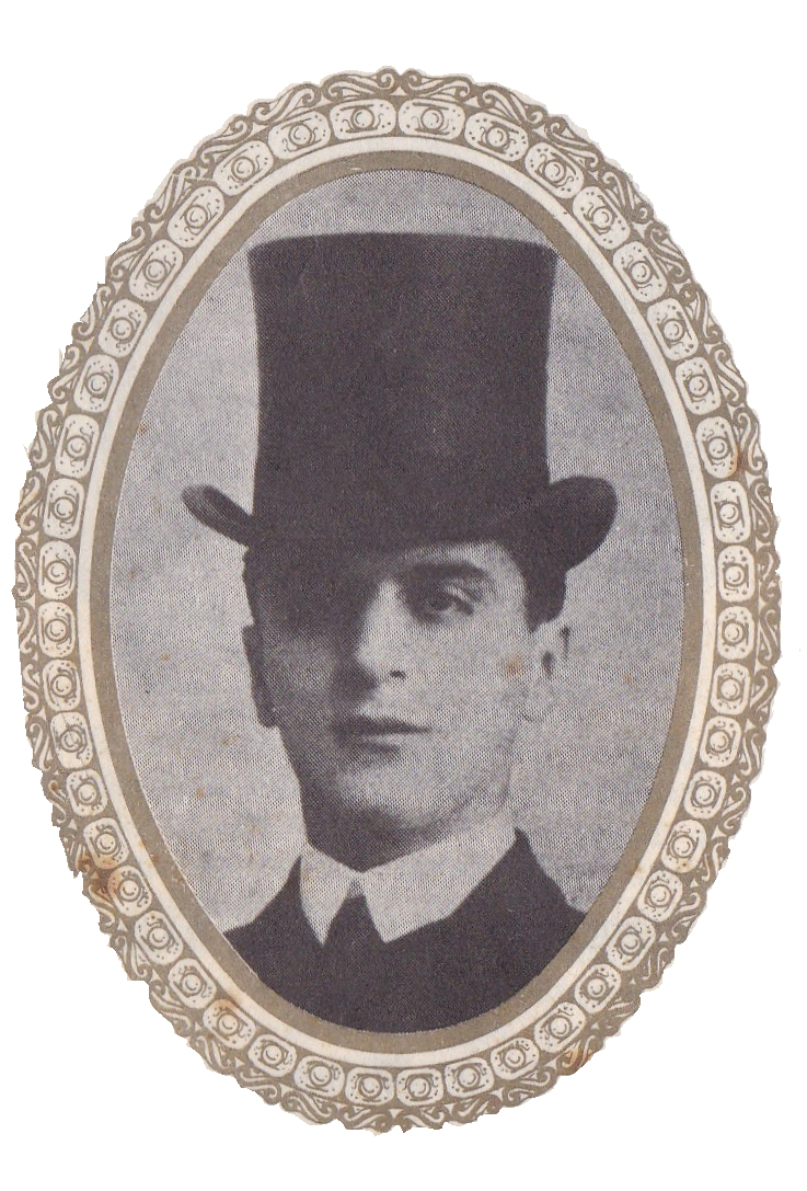 Virgilio Rodríguez Beteta, diputado. Guatemala 1907